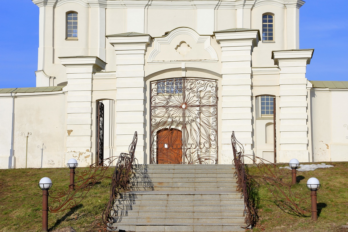 Івянец. Касцёл Св. Міхала Арханёла